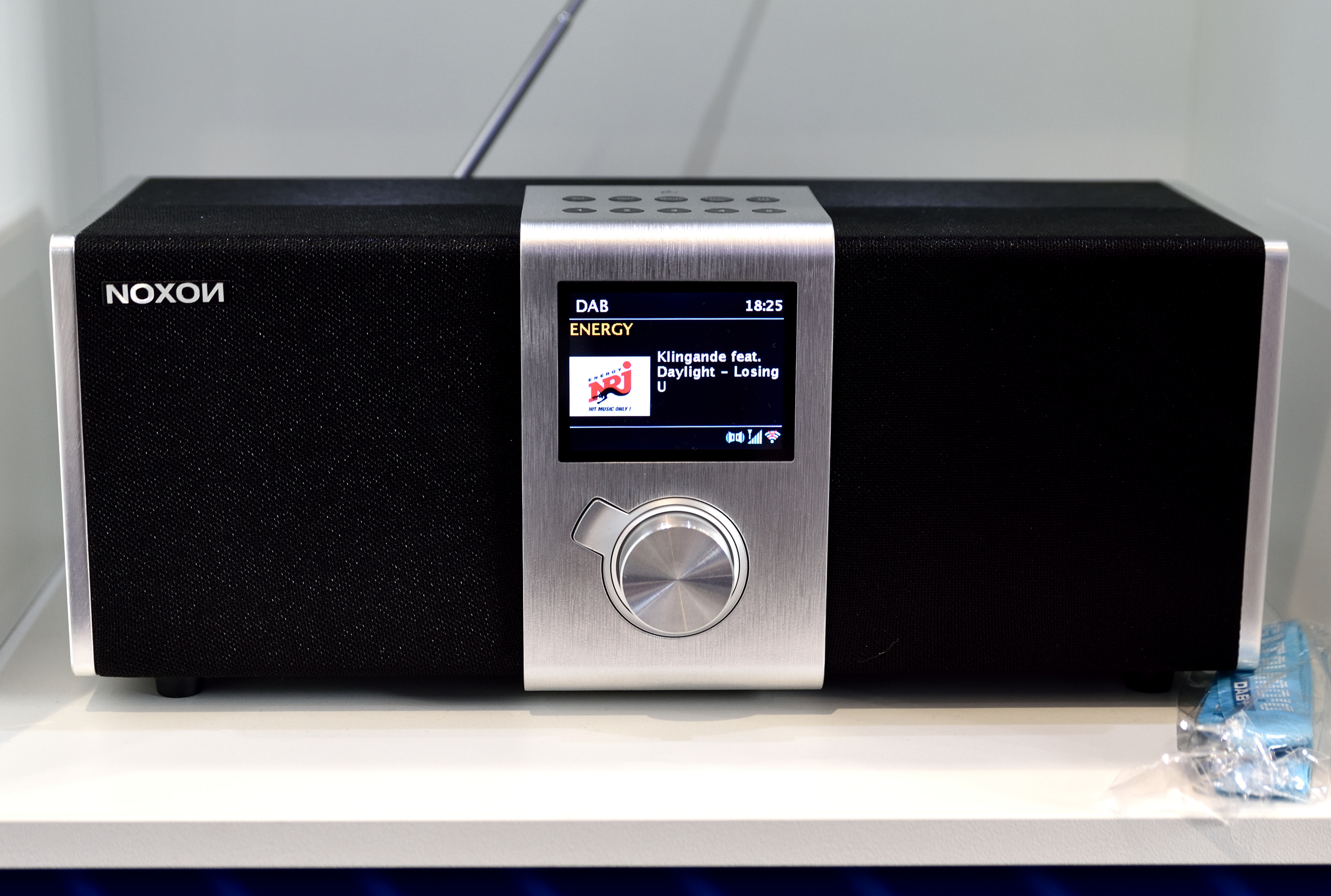 Noxon Nova Internet-DAB+- DAB und UKW Radio auf der CeBIT 2016 in Hannover